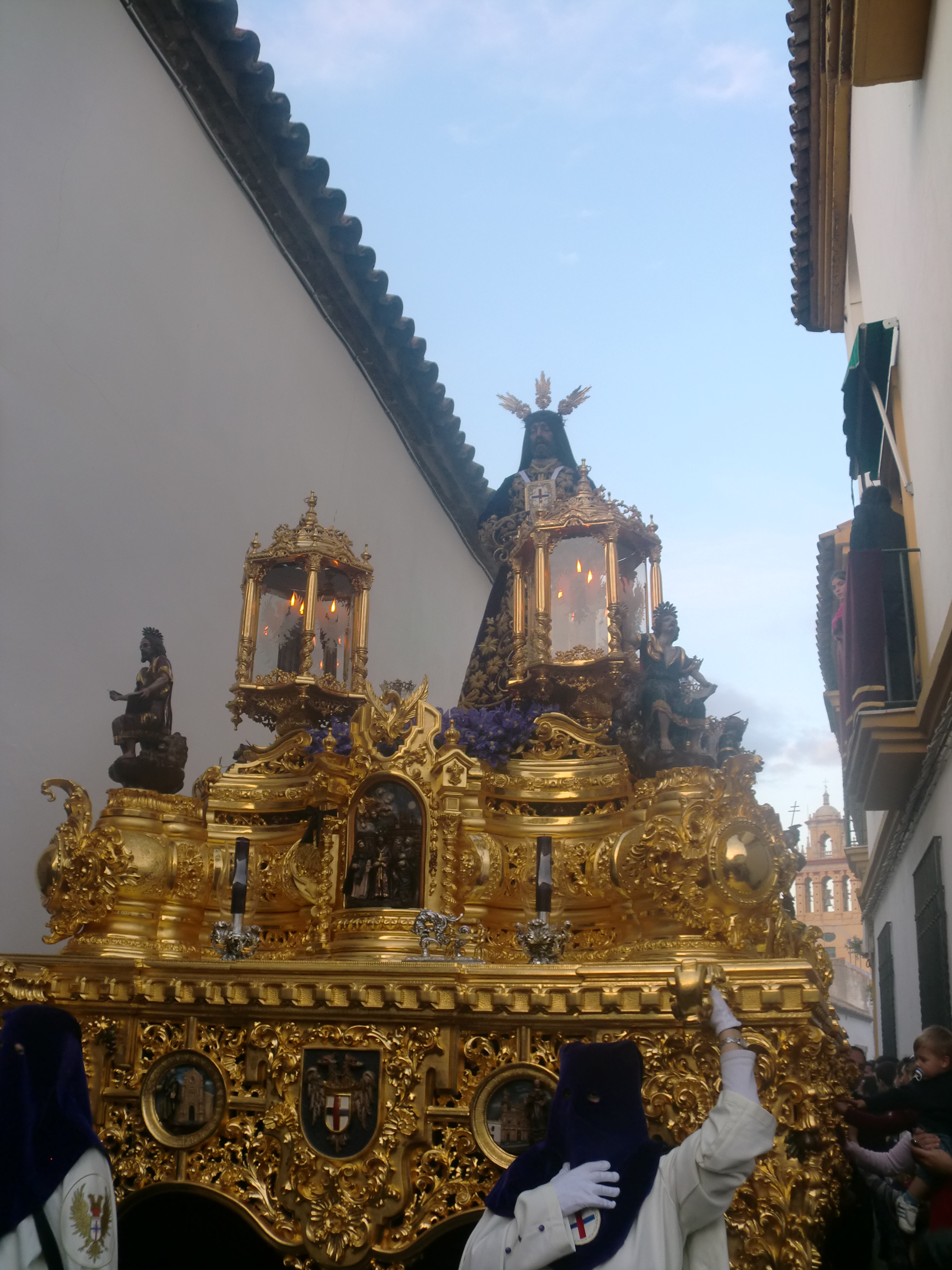 Jesús Rescatado sobre su paso actual